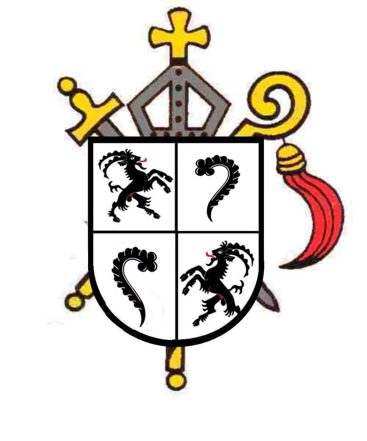 Wappen Ulrich VII. von Federspiel, Fürstbischof von Chur 1692-1728